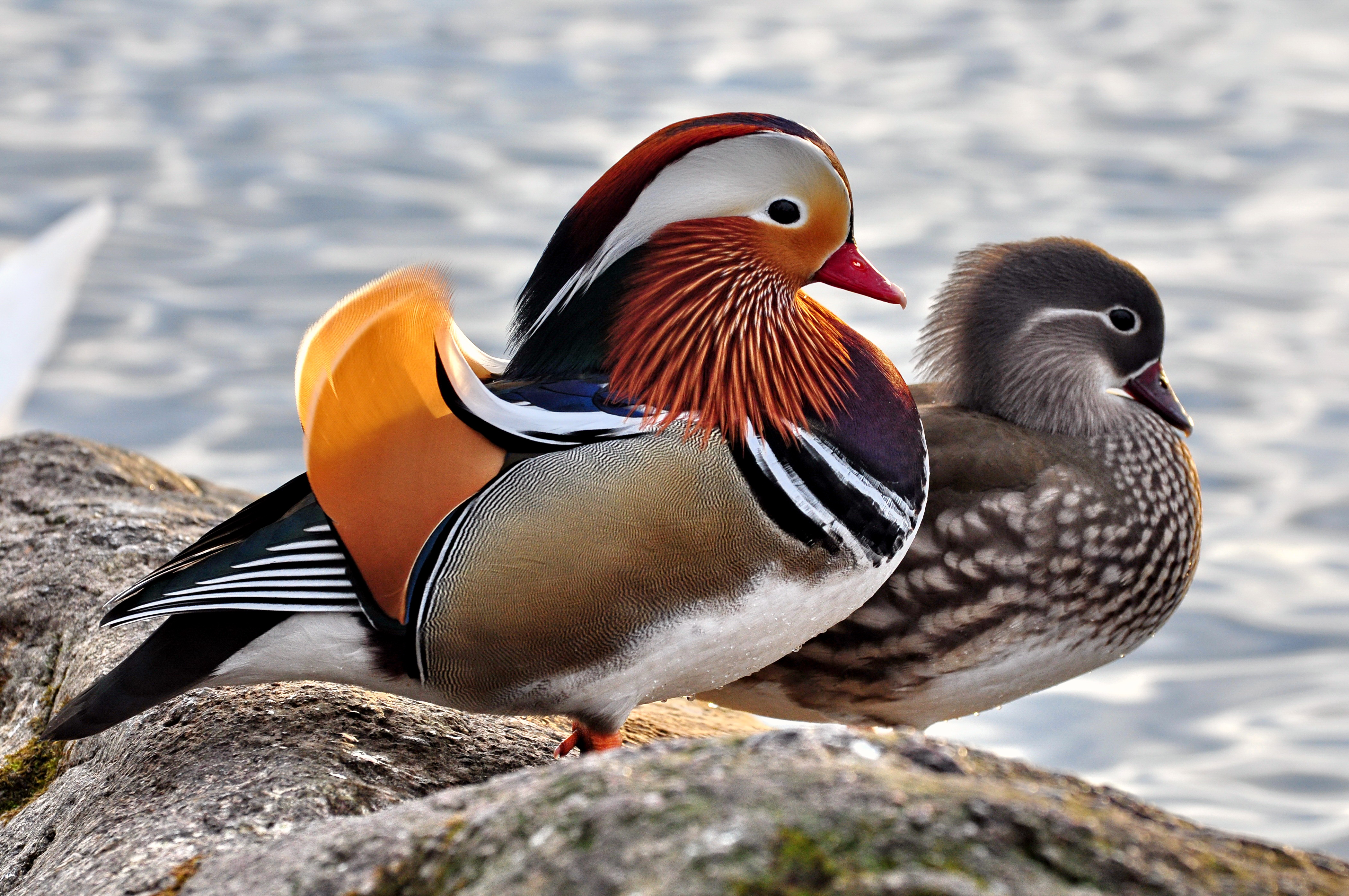 Aix galericulata, Hafen Riesbach in Zürich (Switzerland)